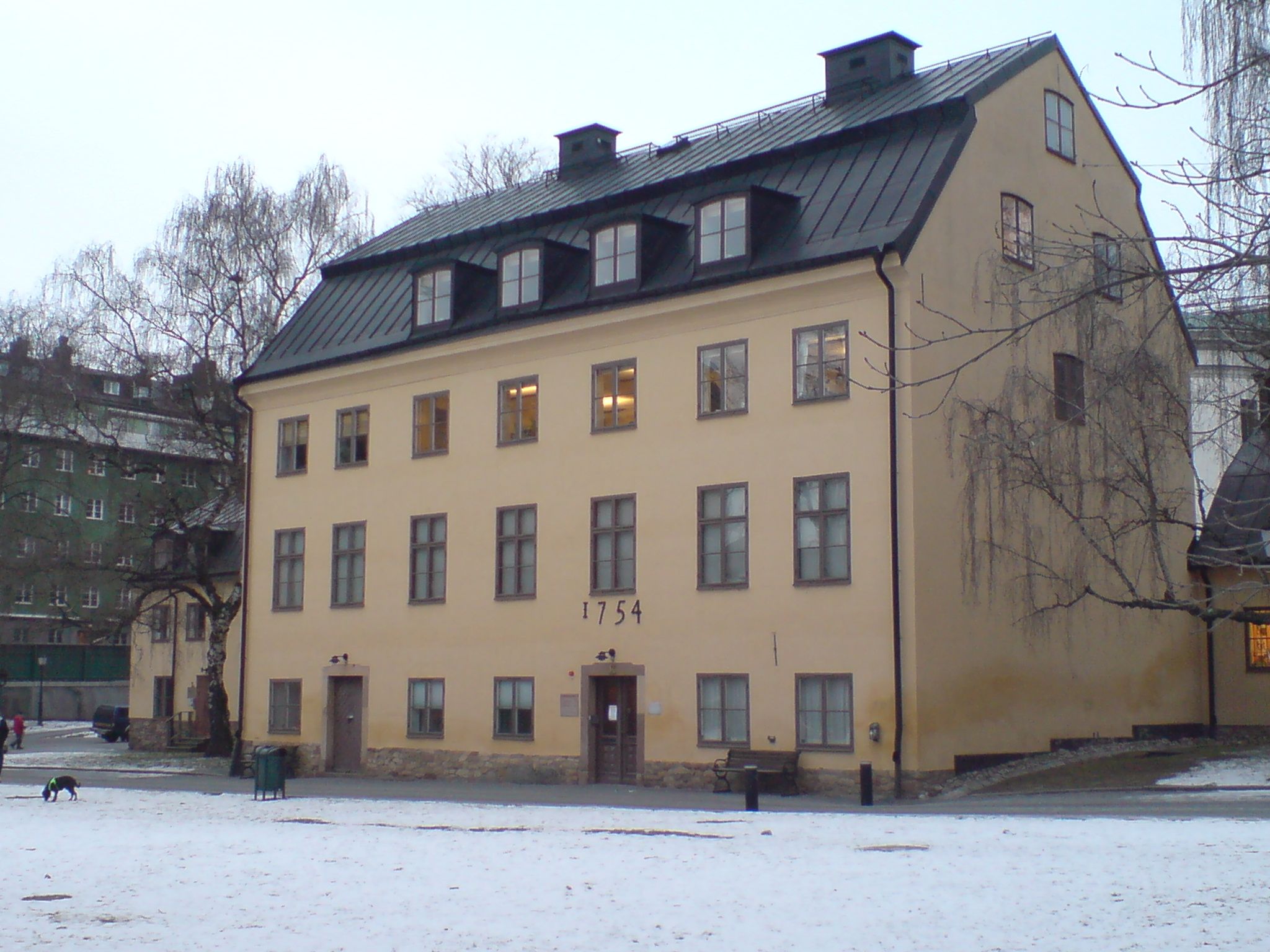 Graverska huset intill Landstingshuset på Kungsholmen används som kontor av landstinget